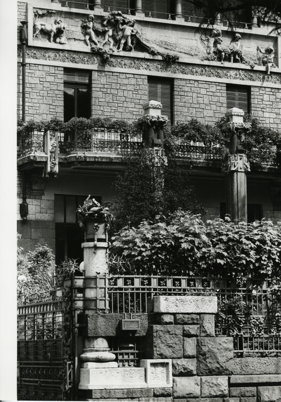 Servizio fotografico : Milano, 1969 / Paolo Monti. - Stampe: 3 : Positivo b/n, gelatina bromuro d'argento/ carta, 24x30. - ((Al verso di una delle stampe manoscritto il numero di negativo corrispondente: 720/22, 720/34-35. Sul coperchio della scatola, manoscritto a pennarello: "Milano monumenti".